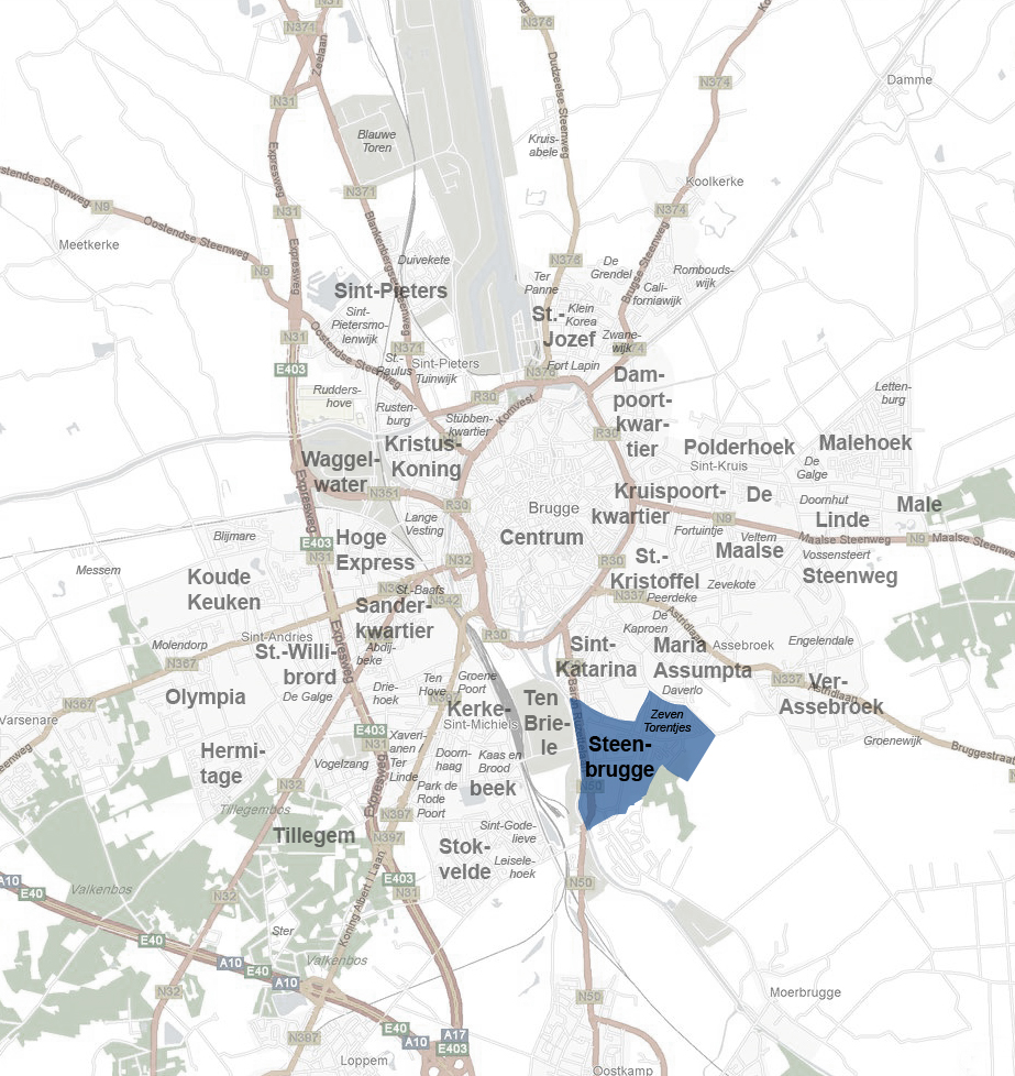 Wijk Steenbrugge, Brugge